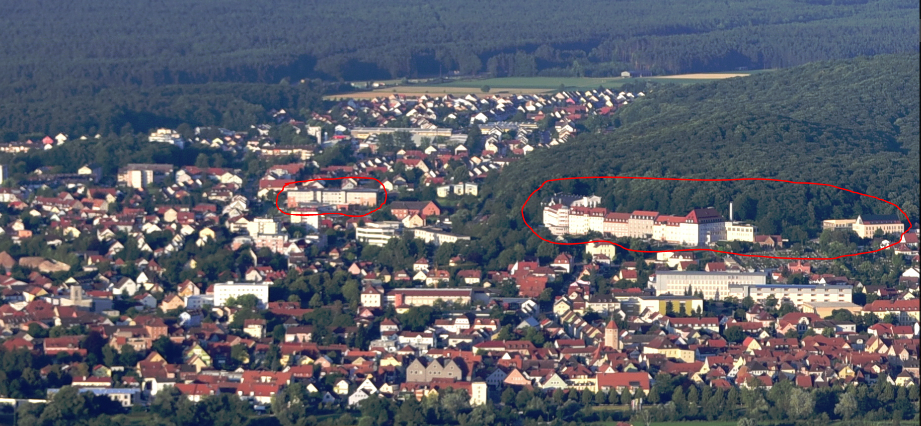 Giunzenhausen mit Hensolthöhe markiert